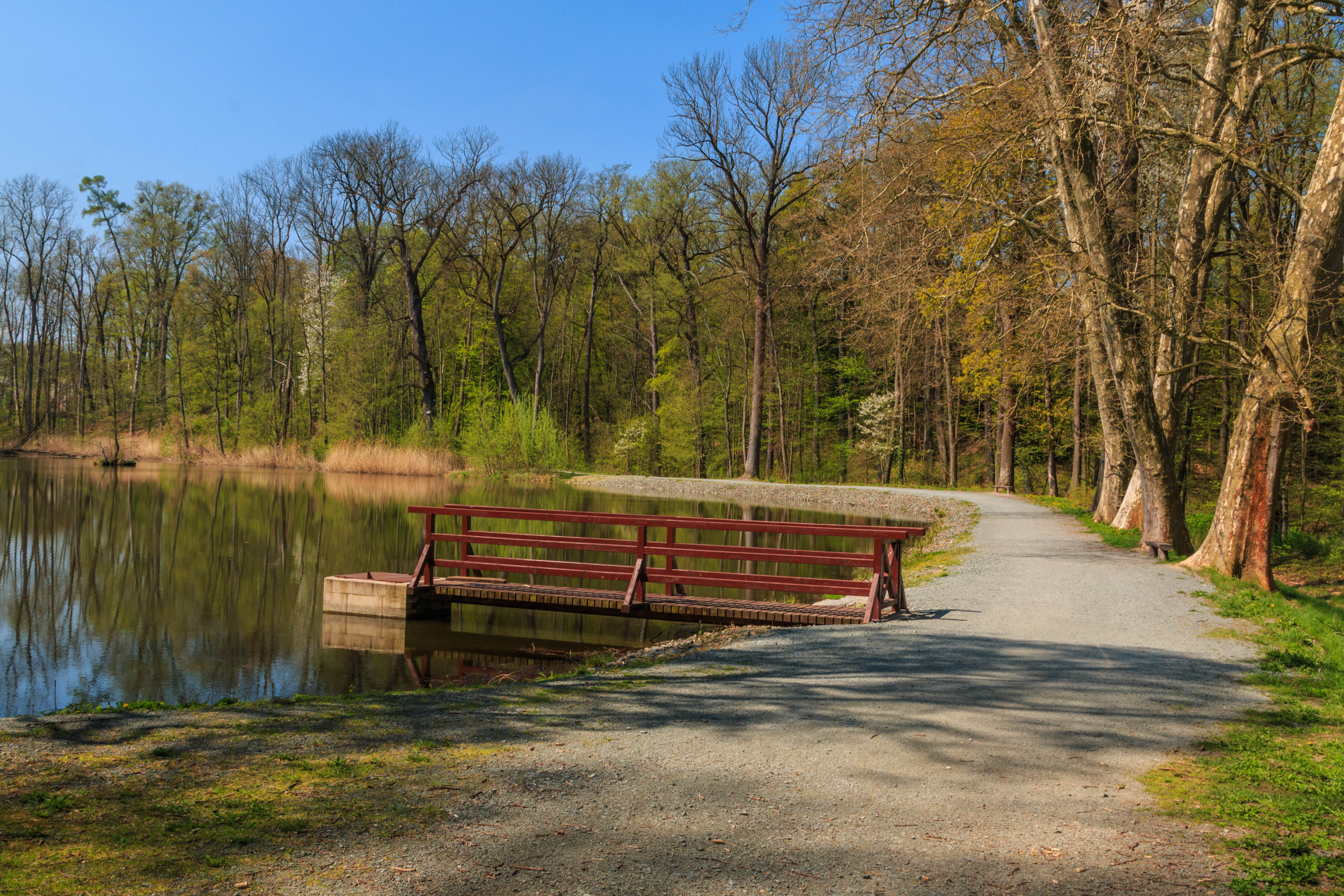 Červený rybník v zámeckém parku v Cholticích Project: Vodstvo.